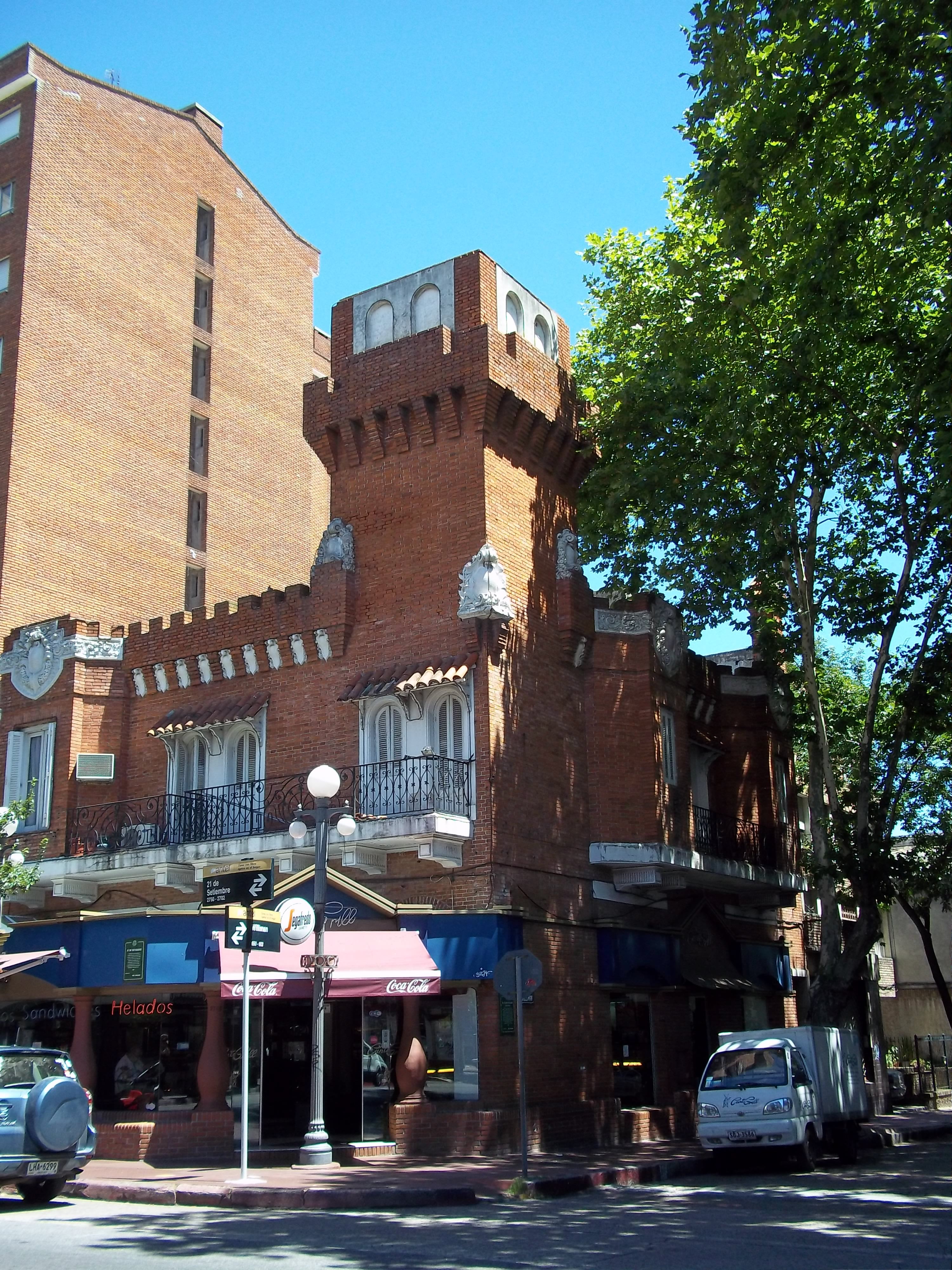 Edificio de la Heladería Cantegril, realizado por el arquitecto Humberto Pittamiglio. Se ubica en el barrio Punta Carretas, en la esquina de 21 de Setiembre y Williman, Uruguay.